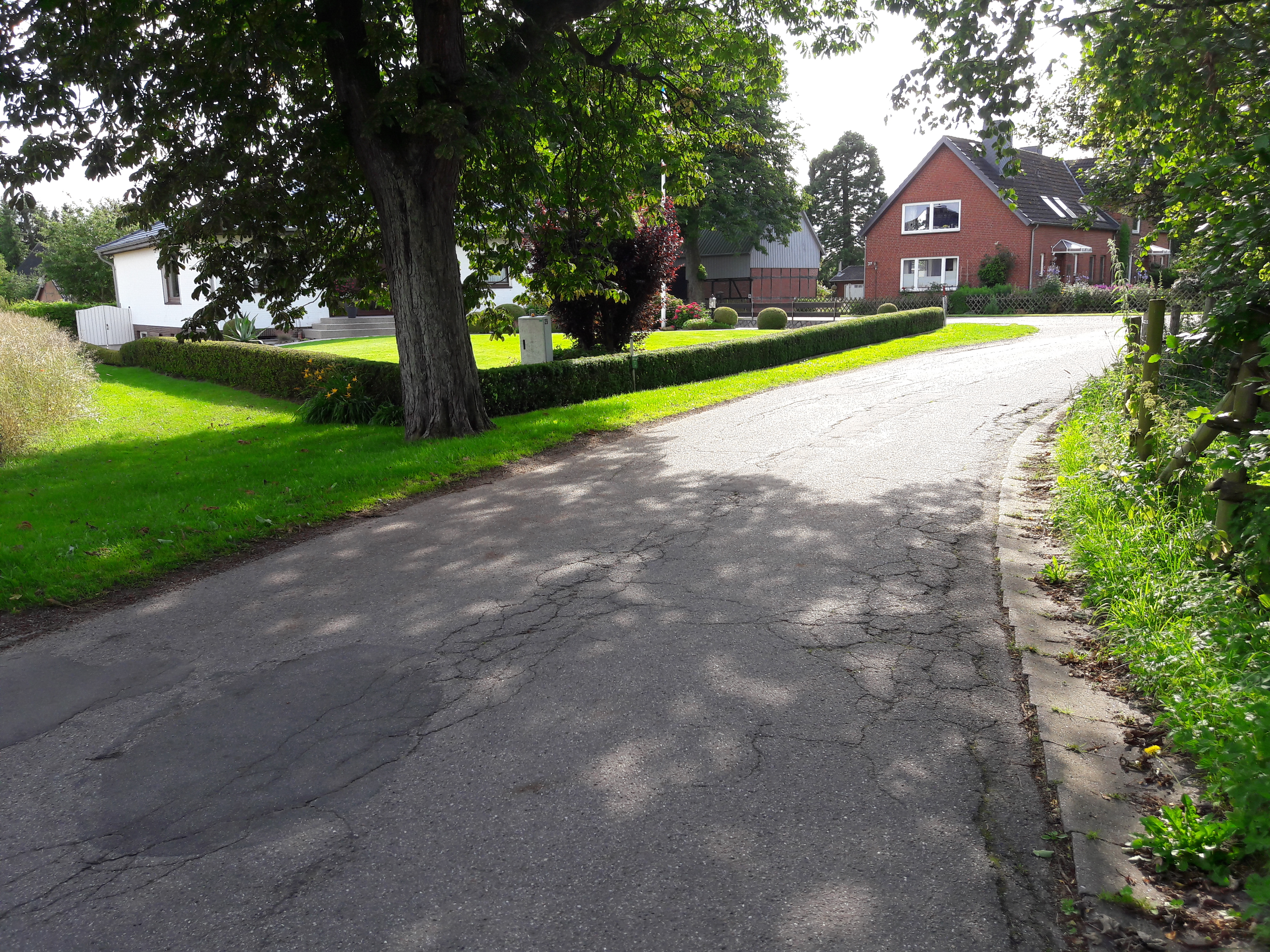 Ortsteil Sturenhagen von Dänischenhagen